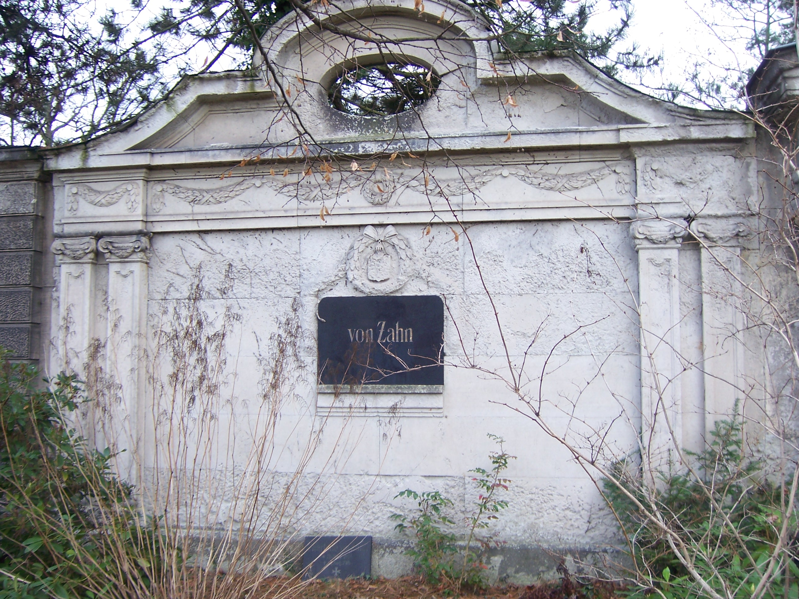 Grabstätte Wilhelm von Zahn und Angehörige auf dem Friedhof Leipzig-Plagwitz